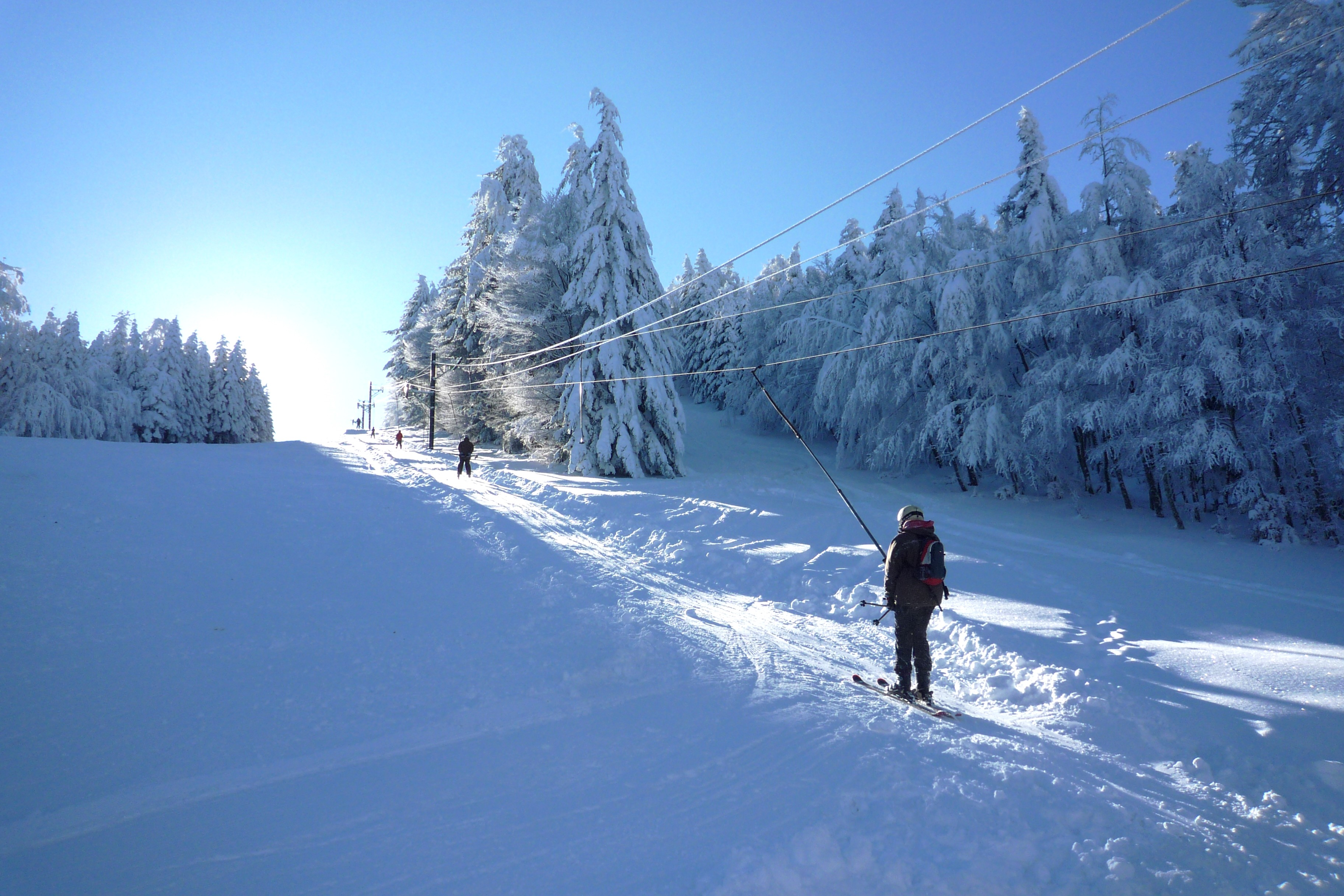 Vue sur le Grand téléski de la station de ski de la Loge des Gardes (Allier - France)